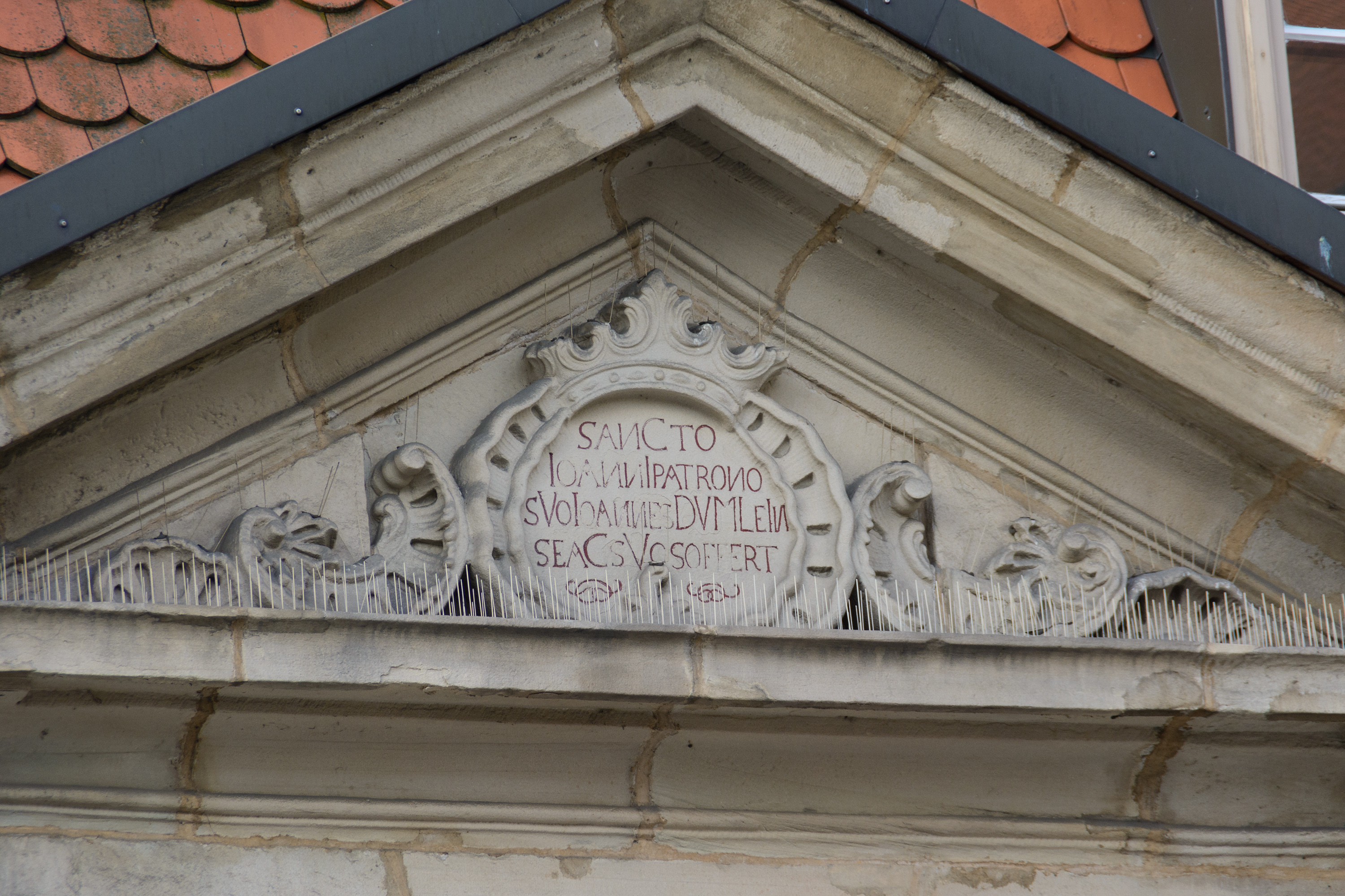 Inschrift des Bauherren Johann Dümlein am Gebäude Schwedenstraße 1 in Kronach. Die Inschrift enthält in der Art eines Chronogramms das Errichtungsjahr 1768 des Gebäudes.